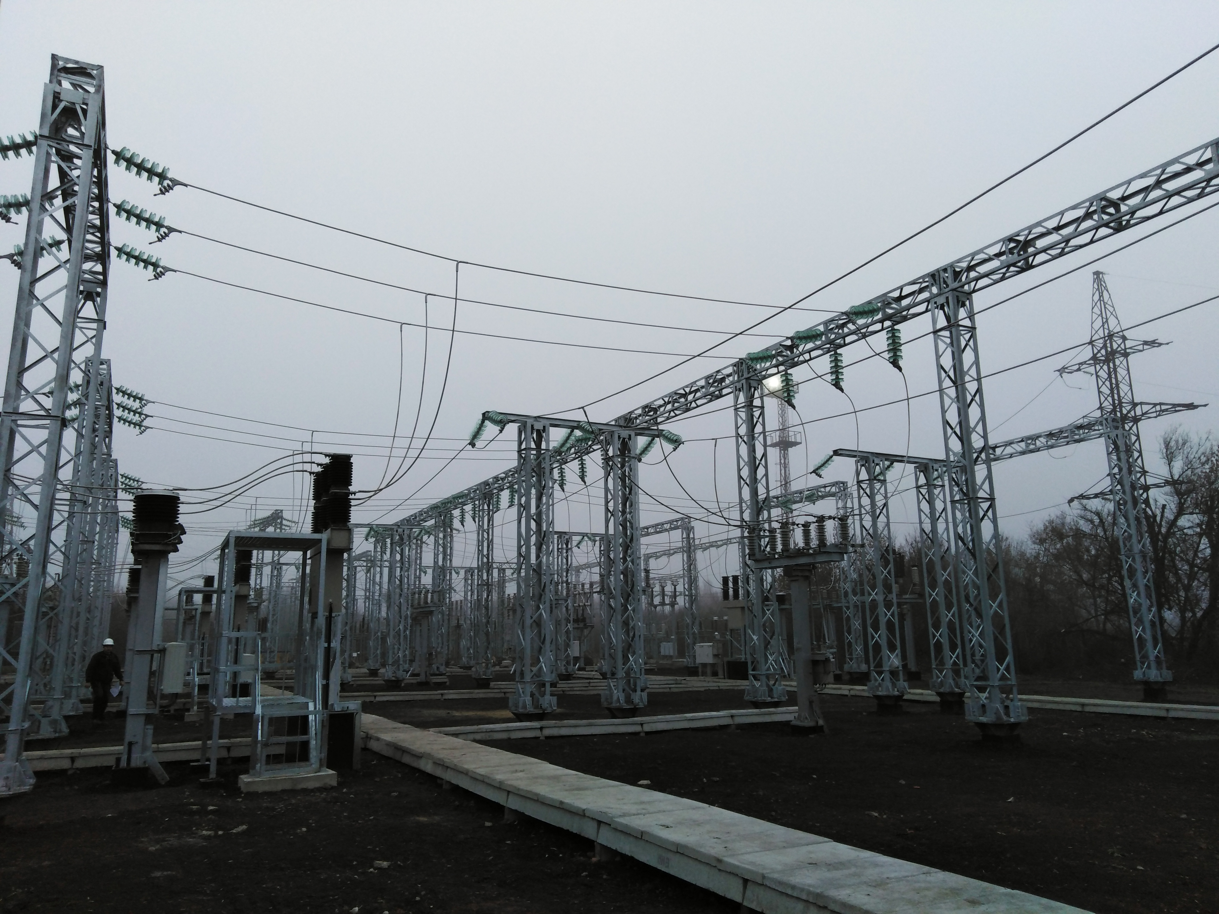 Україна. Полтавська область. Підстанція "Полтаваобленерго" ПС 110/35/10 кВ "Карлівка". ВРУ-35 кВ, позаду якого ВРУ-110 кВ.